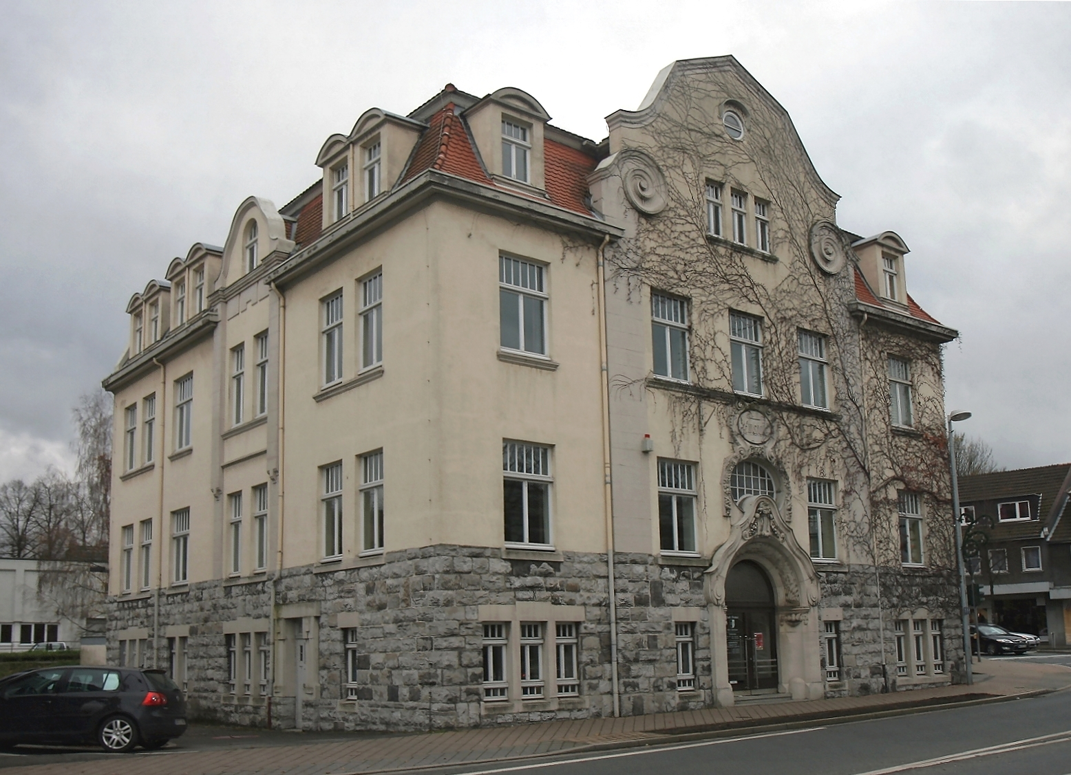 Ehemaliges Amtshaus in Hemer, Hauptstraße 116. Baudenkmal seit 1985.